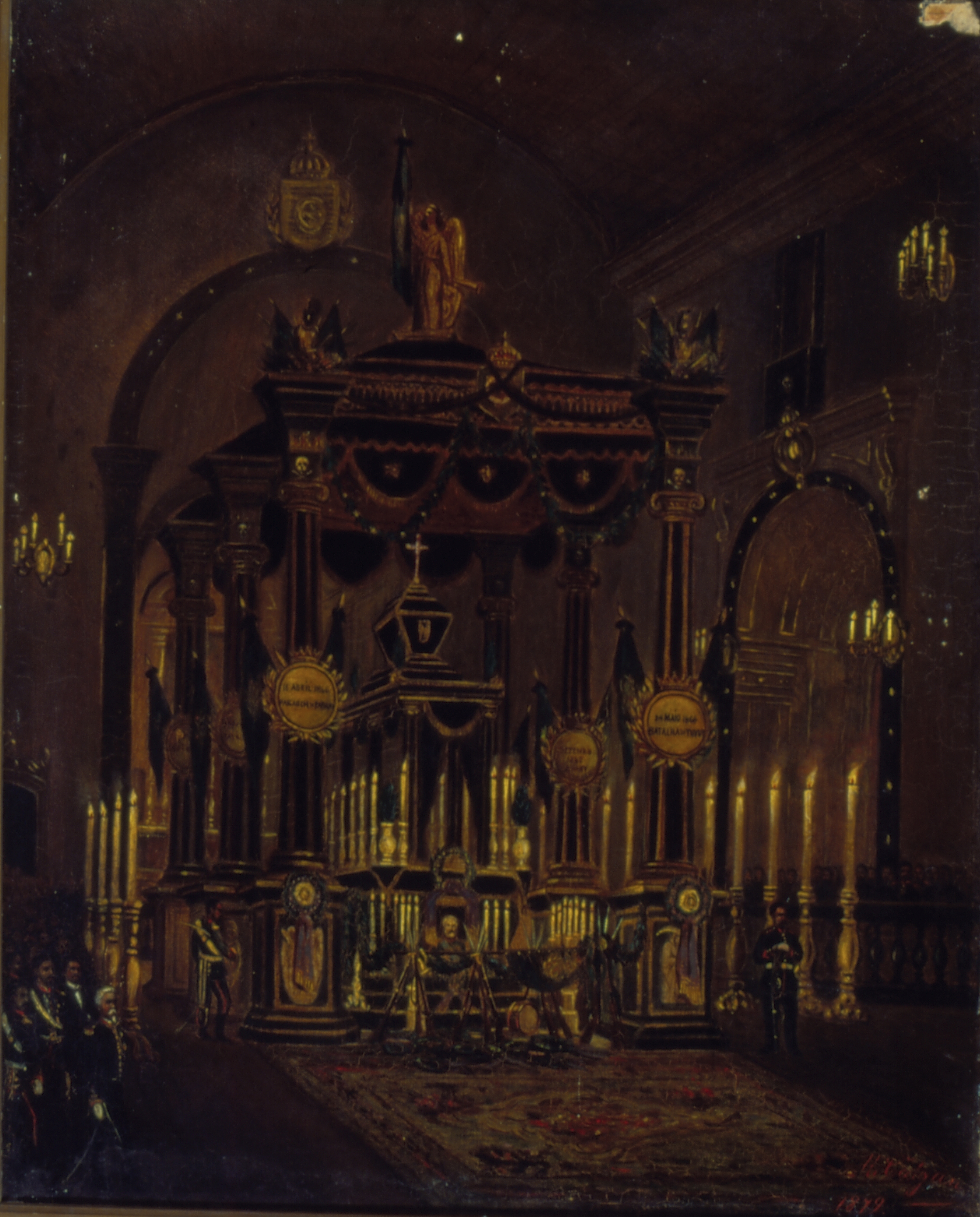 Obra que integra o acervo do Museu Paulista da USP.